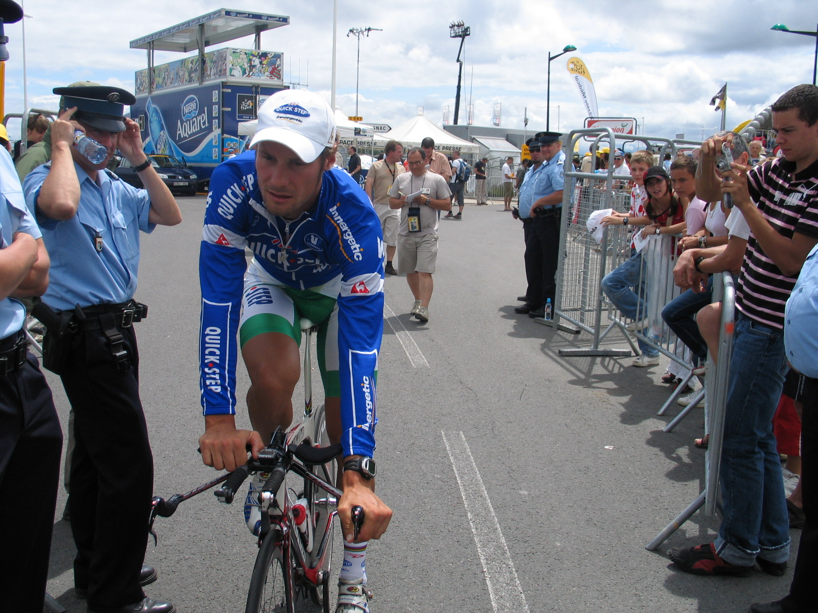 Tom Boonen na de tijdrit te Angoulême op 28 juli 2007 tijdens de Ronde van Frankrijk